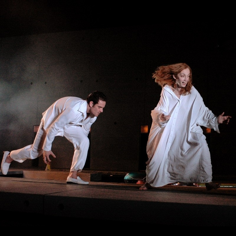 יבגניה דודינה ומיקי לאון בהצגה מדיאה, תיאטרון גשר